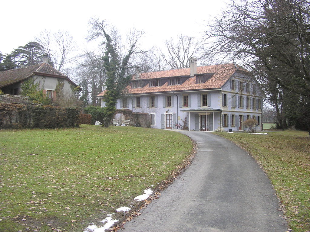 Petit Bossey, commune de Bogis-Bossey, Vaud, Suisse